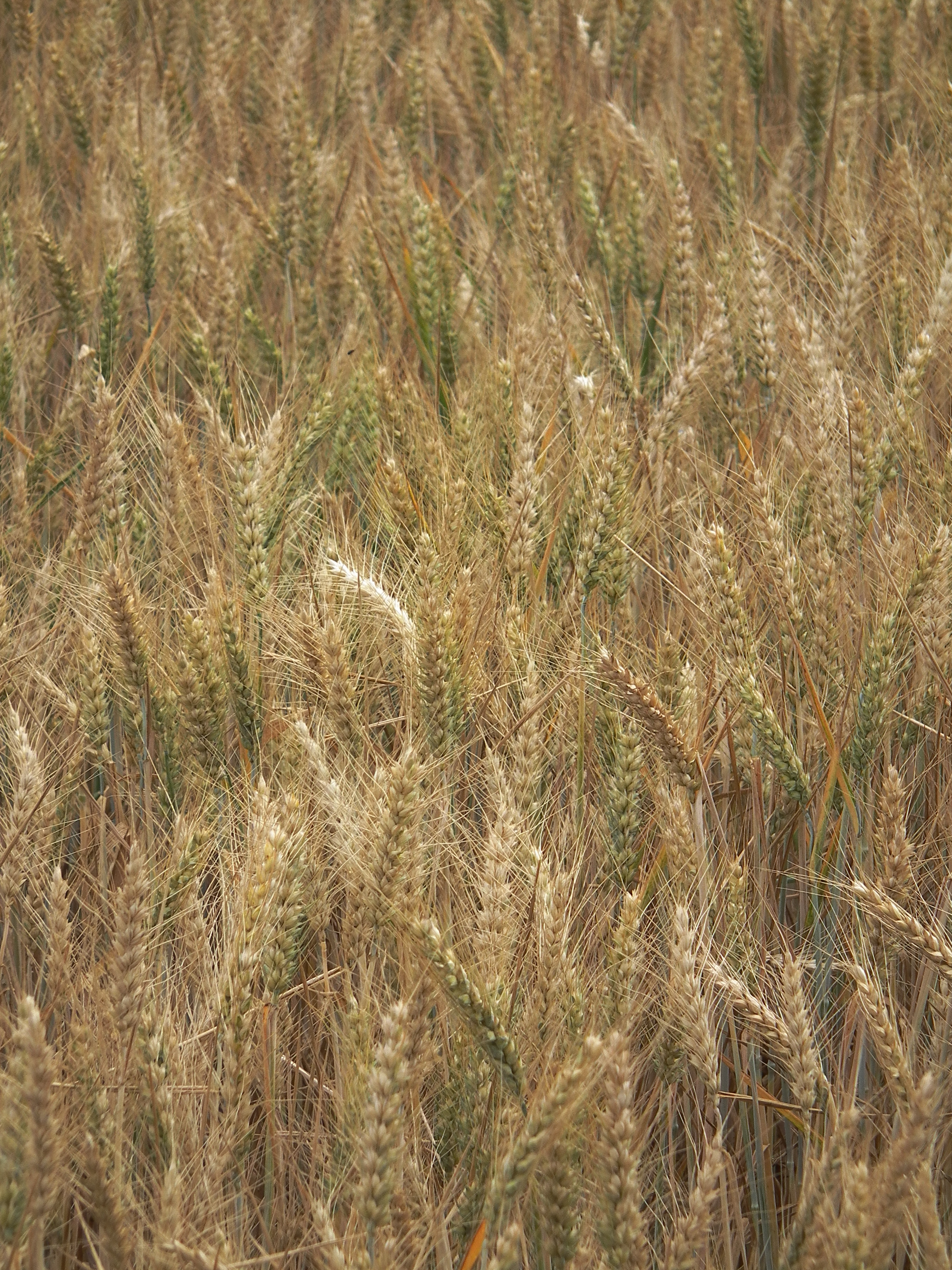 Winterweichweizen (Triticum), frühe Grannenweizensorte „Arezzo“ von RAGT, Kategorie Z1, Schlagbezeichnung „Kleine Heide (011)“, fotografiert in Heidelberg (Baden-Württemberg, Deutschland)